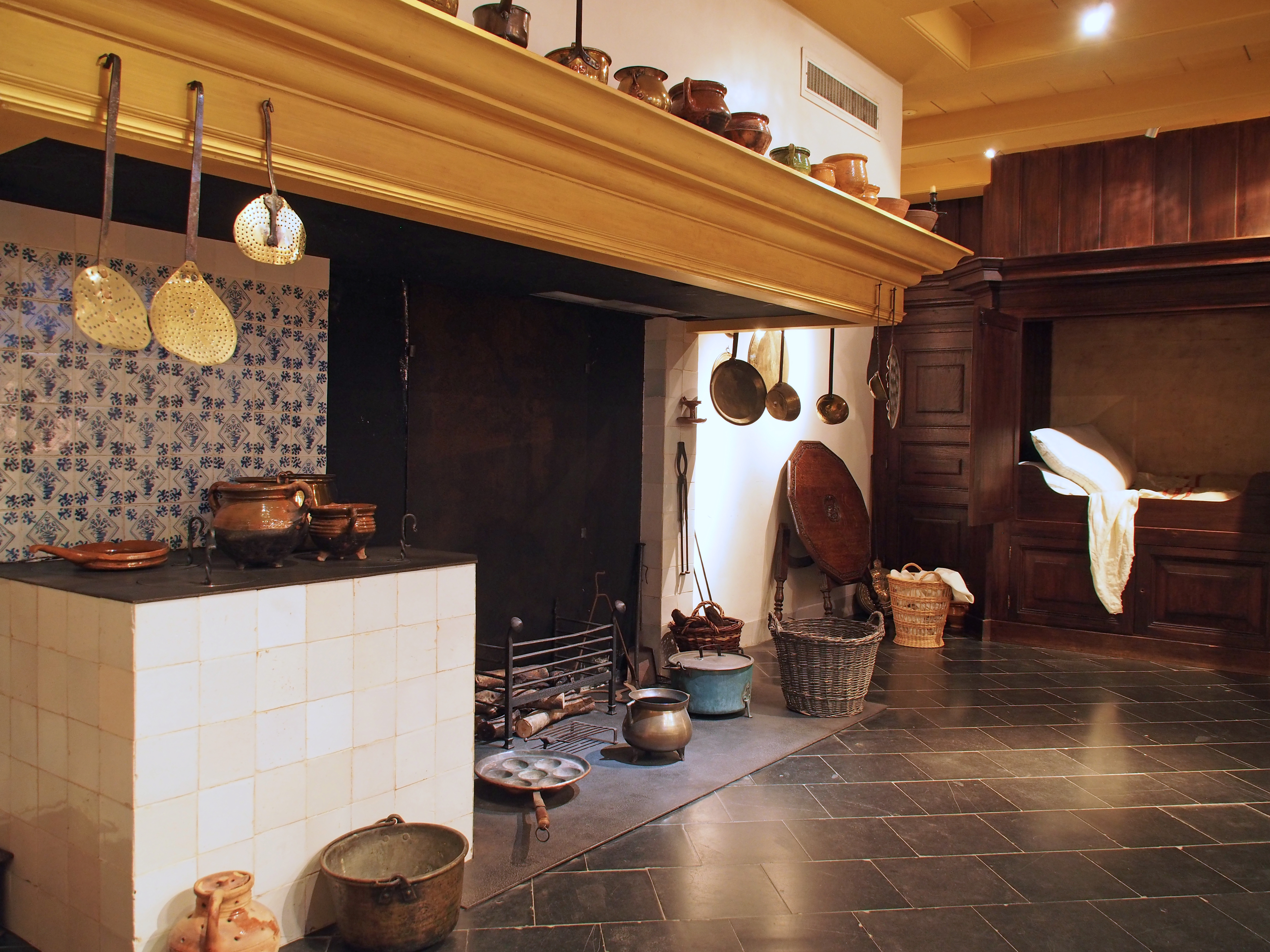 Küche im Rembrandthaus, mit Schlafkoje der Dienstmagd